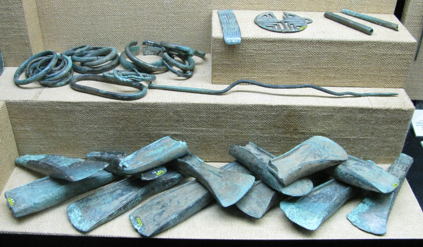 Trésor découvert en 1856 à Vernaison (Rhône), composés de 13 haches usées, de lames de faucilles et d'autres objets, destinés à être refondus. Datation vers 1100 av. J.-C.. Exposés au musée gallo-romain de Lyon